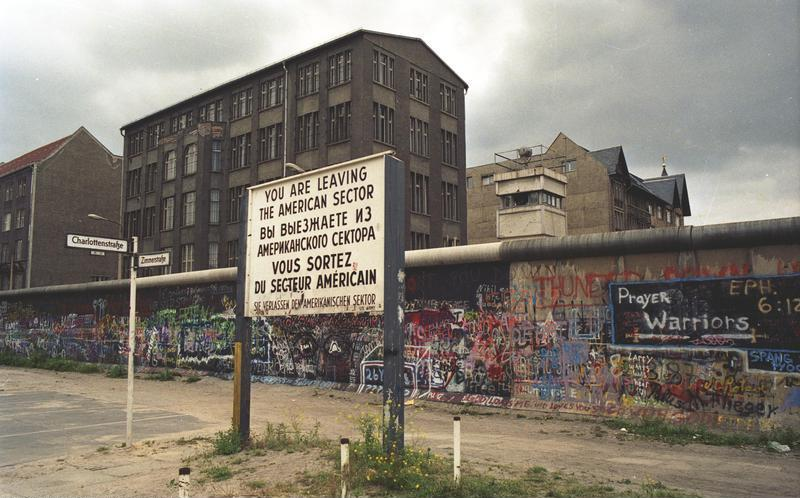 Juni 1988 Berlin (West), Mauer